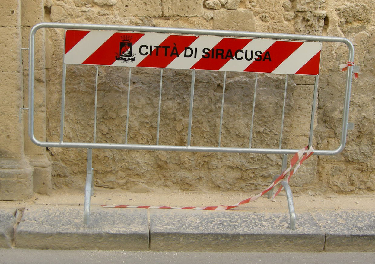 Ortigia, transenna